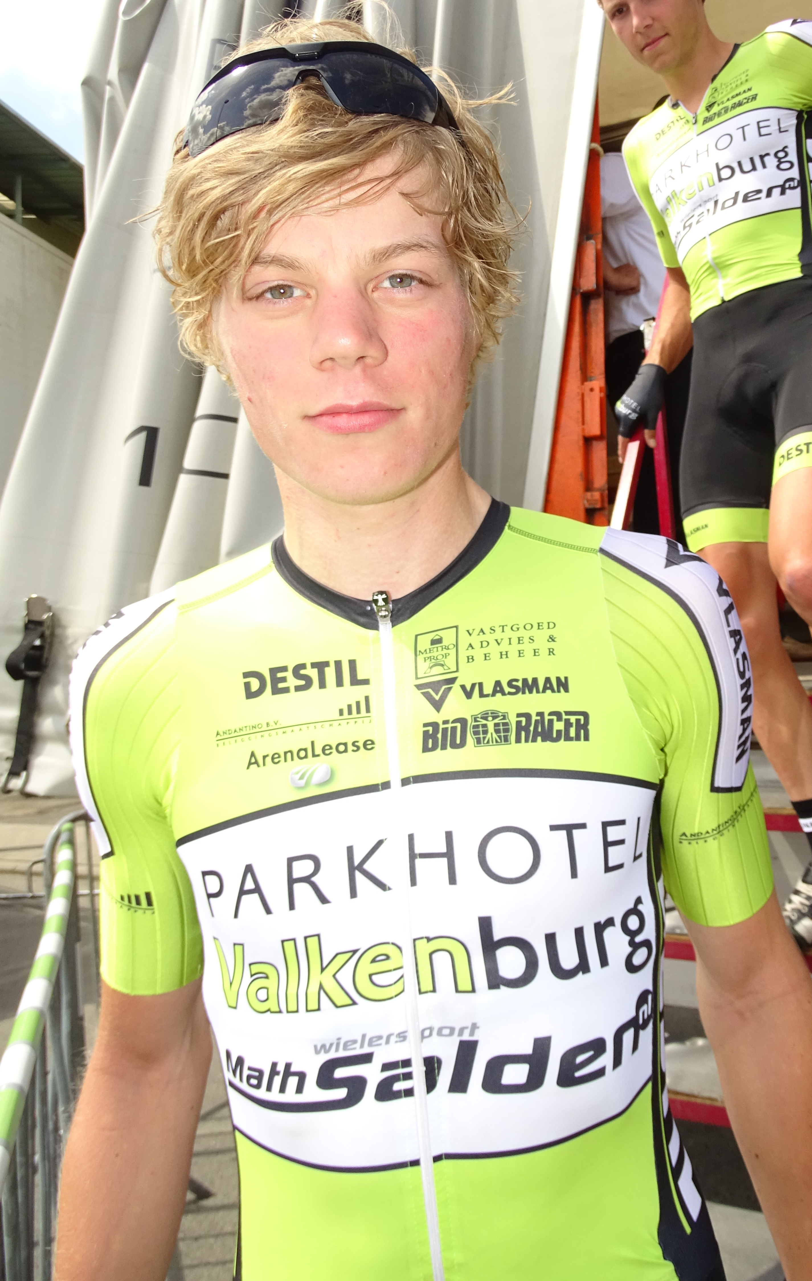 Reportage réalisé le dimanche 7 juin à l'occasion du départ du Mémorial Philippe Van Coningsloo 2015 à Wavre, Belgique.